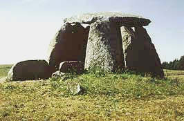 copied from dolmen de la "Anta de Barrocal", Evora, Portugal Source : Bruno MARC Licence : GFDL